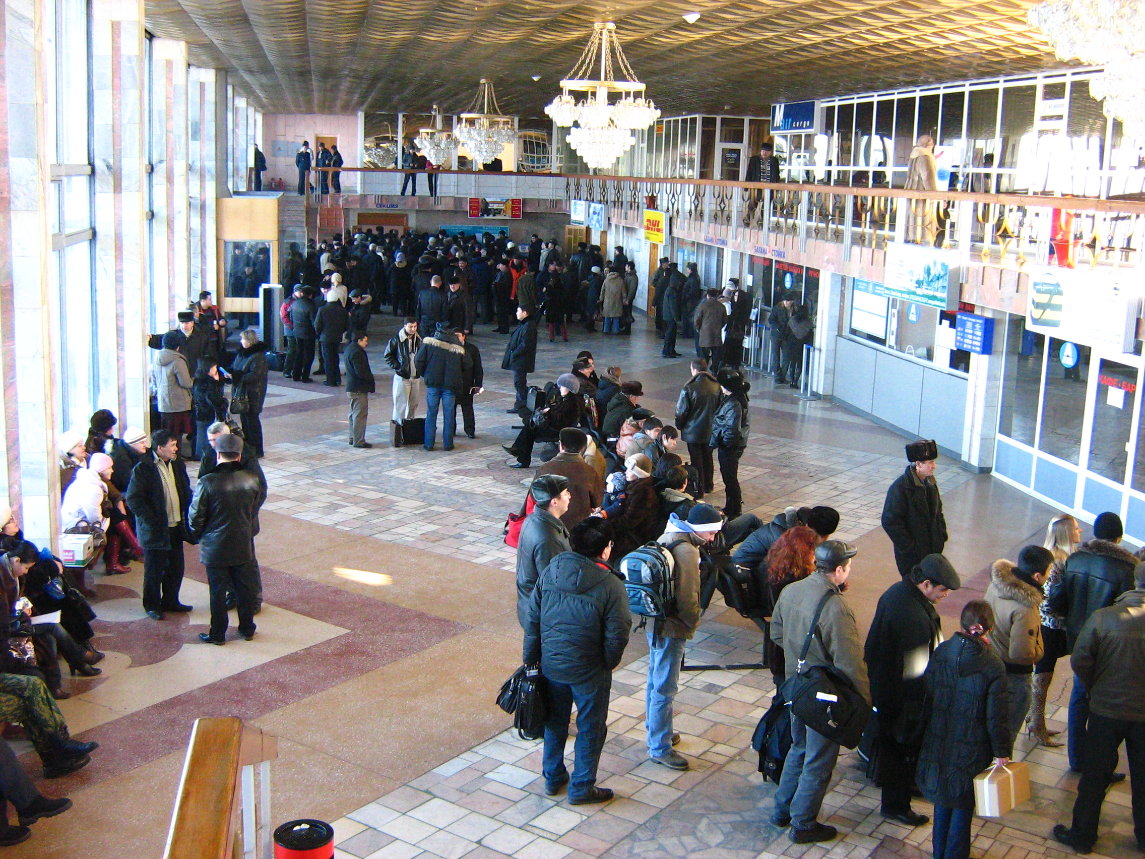 Atyrau Airport, Kazakhstan